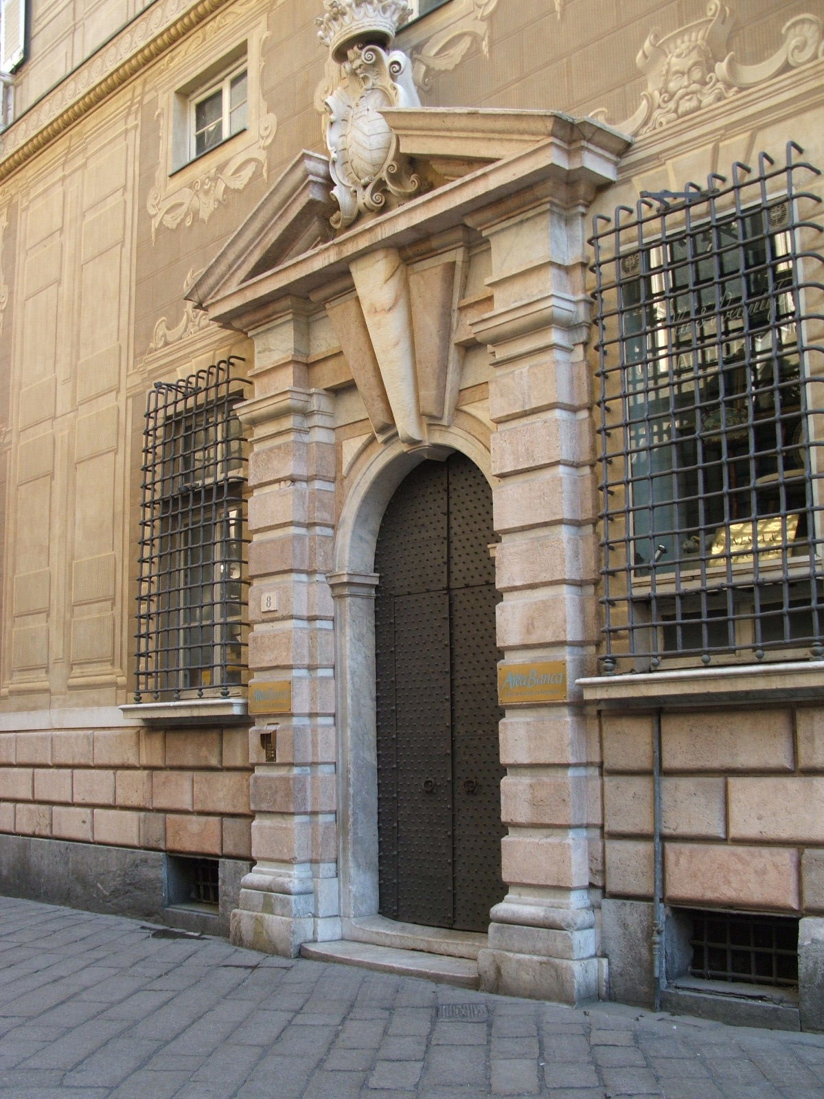 Genova, Via Garibaldi Portale del Palazzo Cattaneo Adorno di via Garibaldi